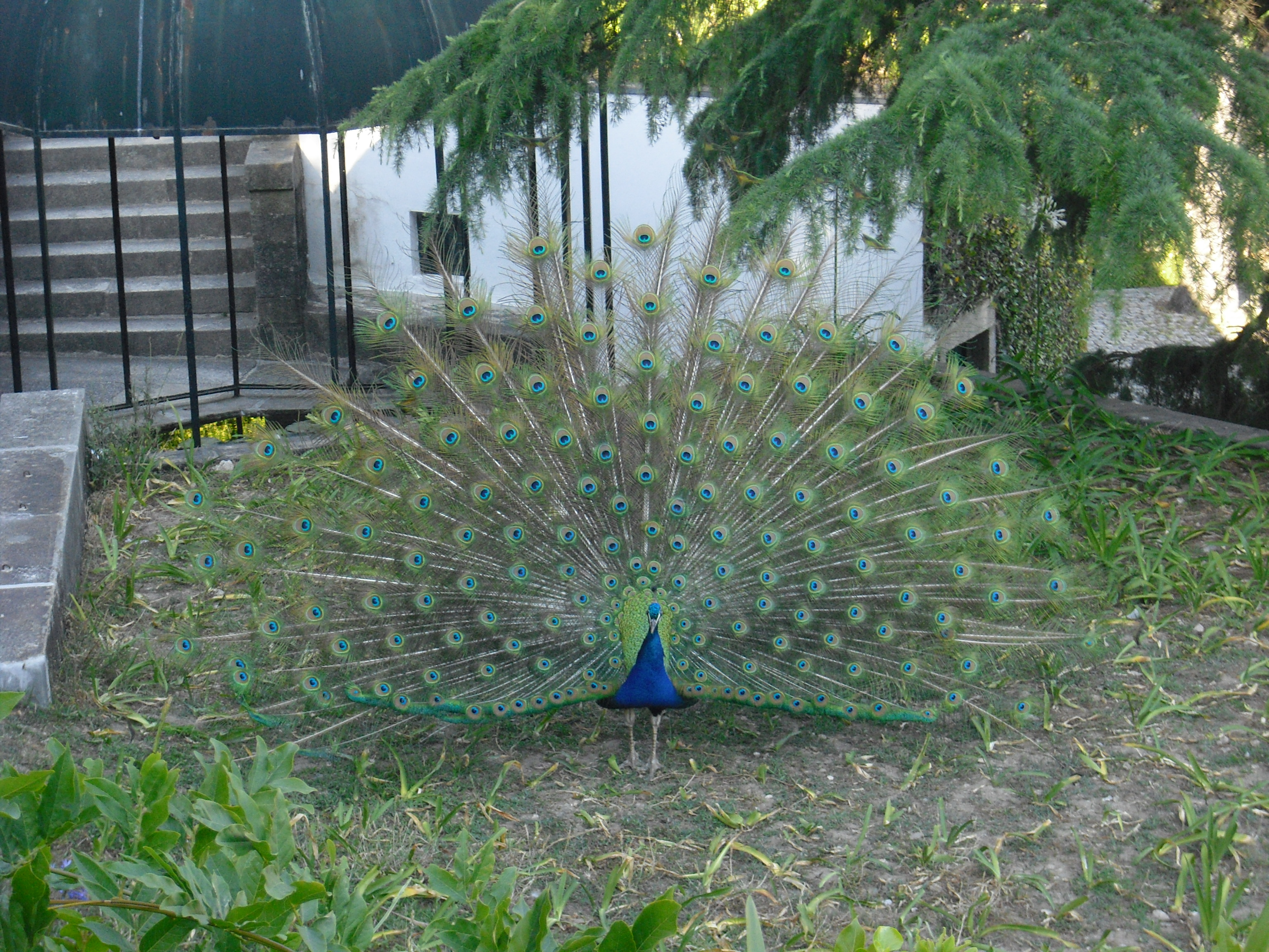 Jardins do Palácio de Cristal, Porto. This file was uploaded for Wiki Loves Monuments in Portugal with the unique identifier 97021772.